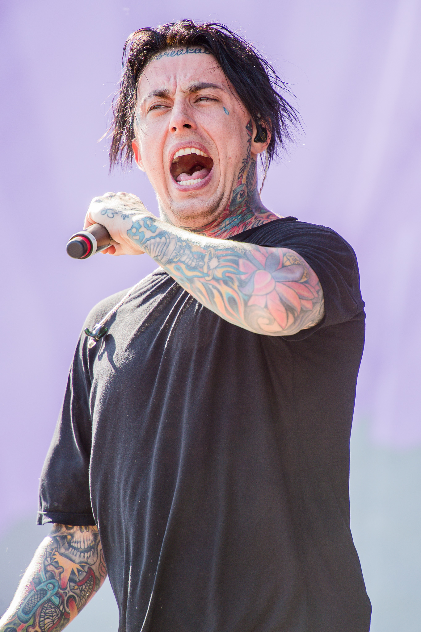 ARGO-Konzerte,Centerstage,Falling in Reverse,Konzert,Livekonzert,Livemusik,Musik,RiP,Rock im Park 2014,Ronnie Radke